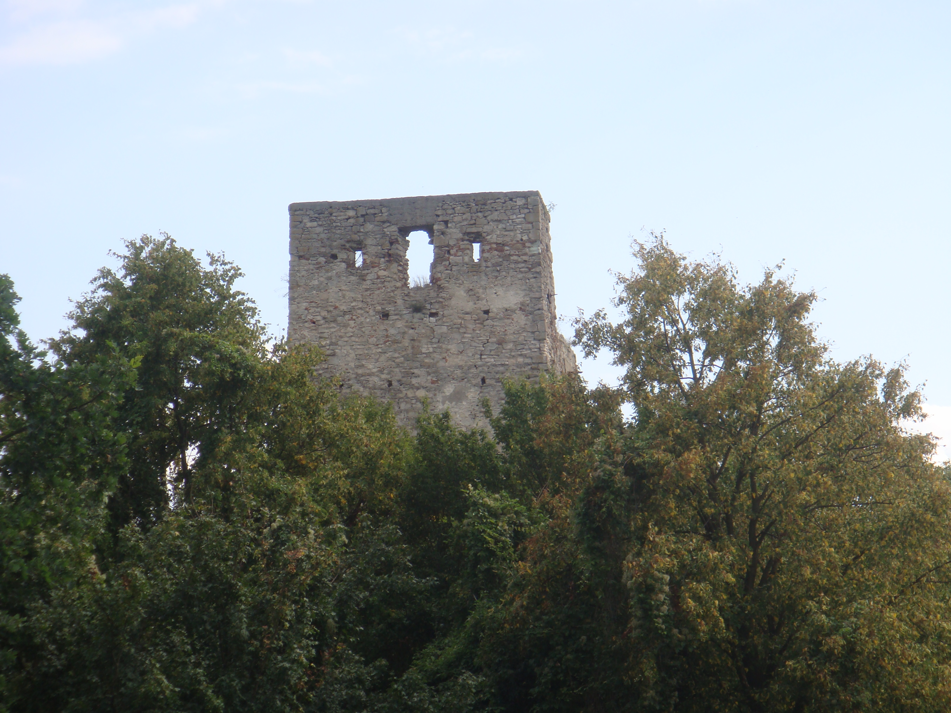 Cetatea Almașului de lângă satul Almașu, Sălaj, a fost construită între anii 1247-1278